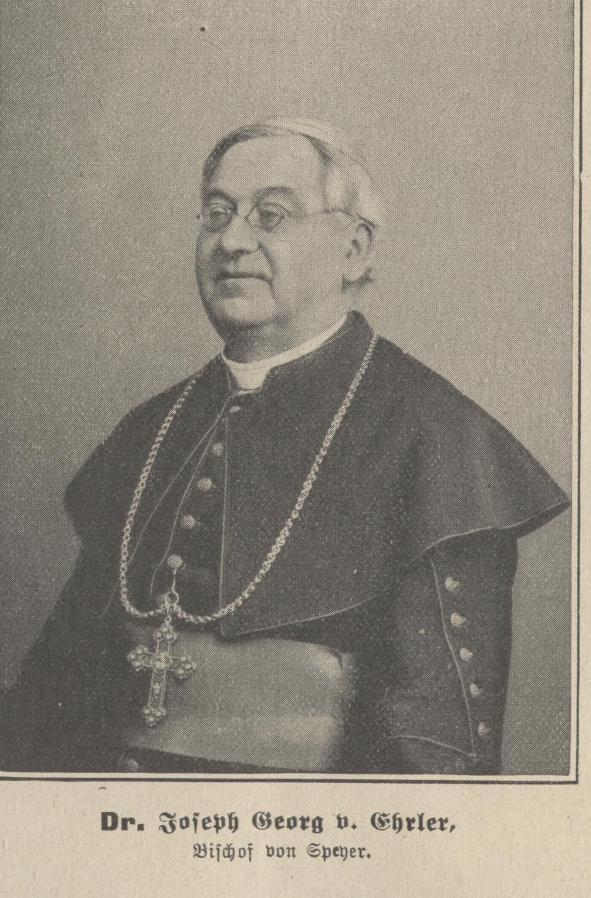 Bischof Georg von Ehrler, Speyer